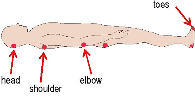 پوزیشن خوابیده به پشت